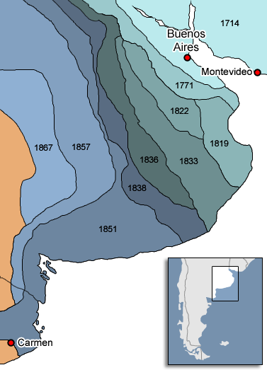 mapa de la frontera de la provincia de buenos aires con la nacion mapuche y otros pueblos originarios